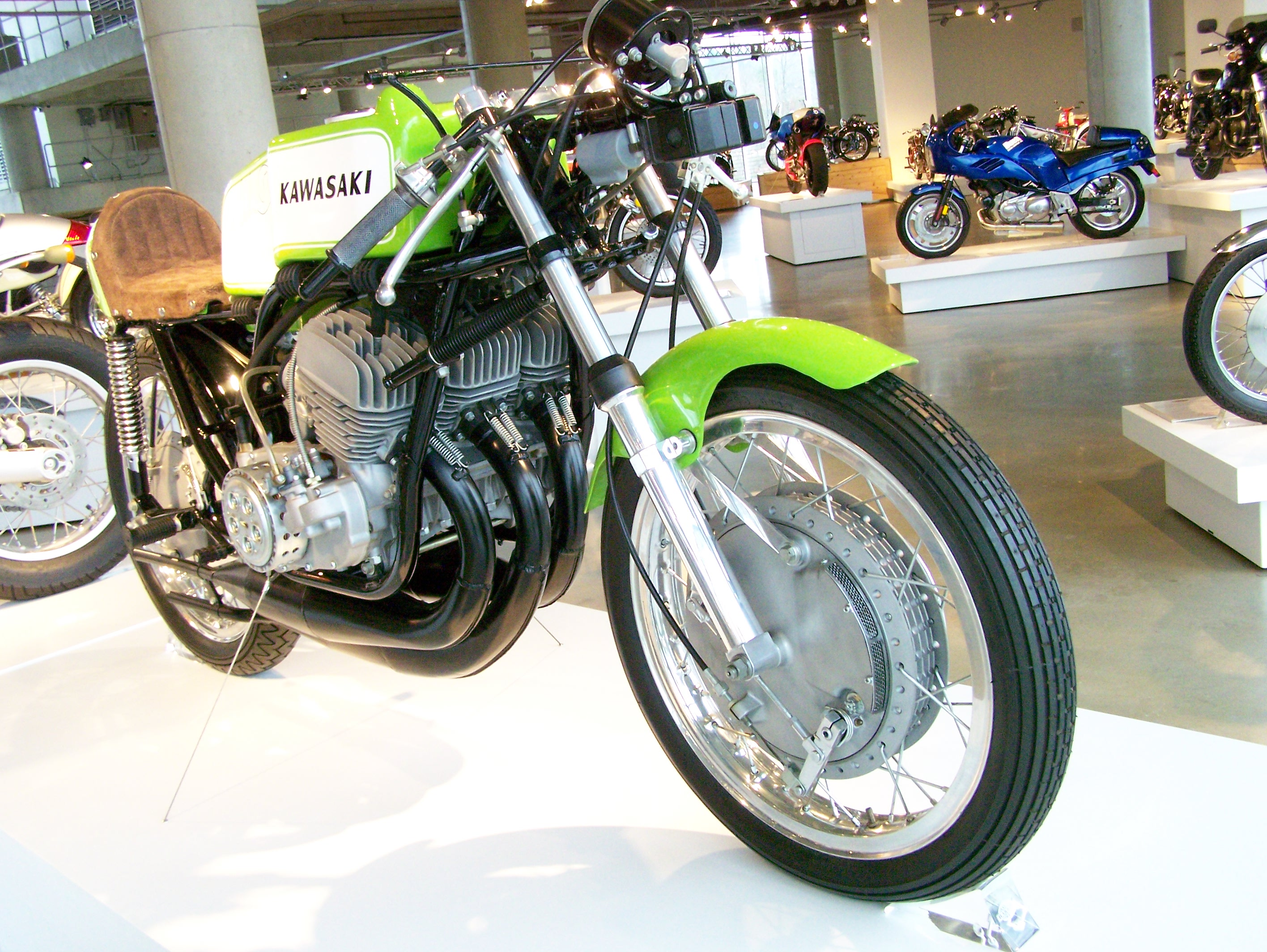 1972 Kawasaki H1RA Barber Vintage Museum_129